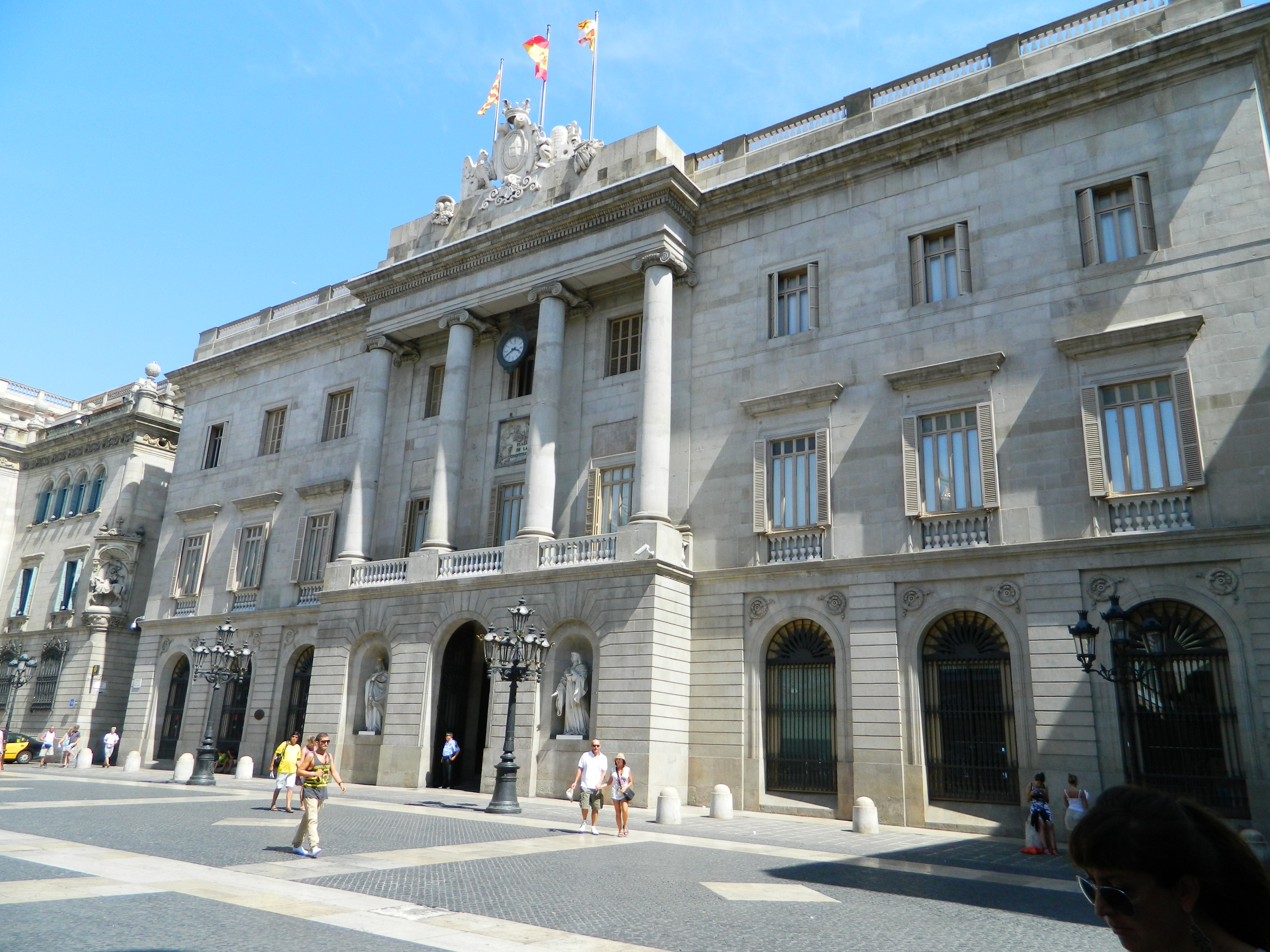 Barcelona